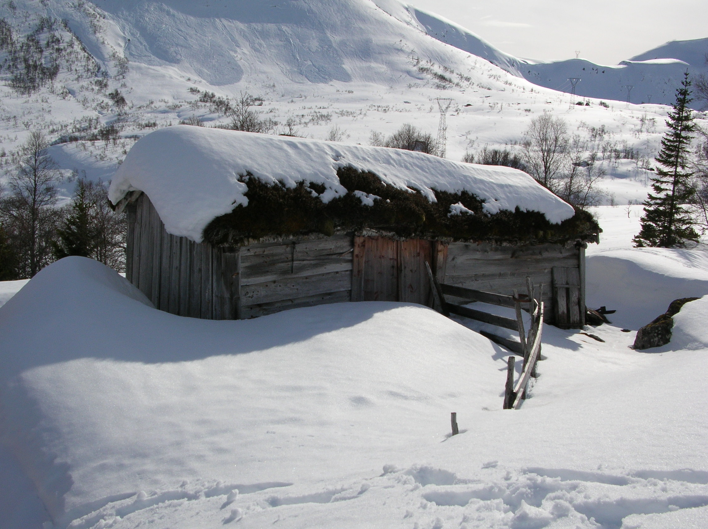 An old house (small barn) at Oppedal, Gaular, Sogn og Fjordane county, Norway. (No:Utløe på Oppedalsstølen, brukt til høylager)